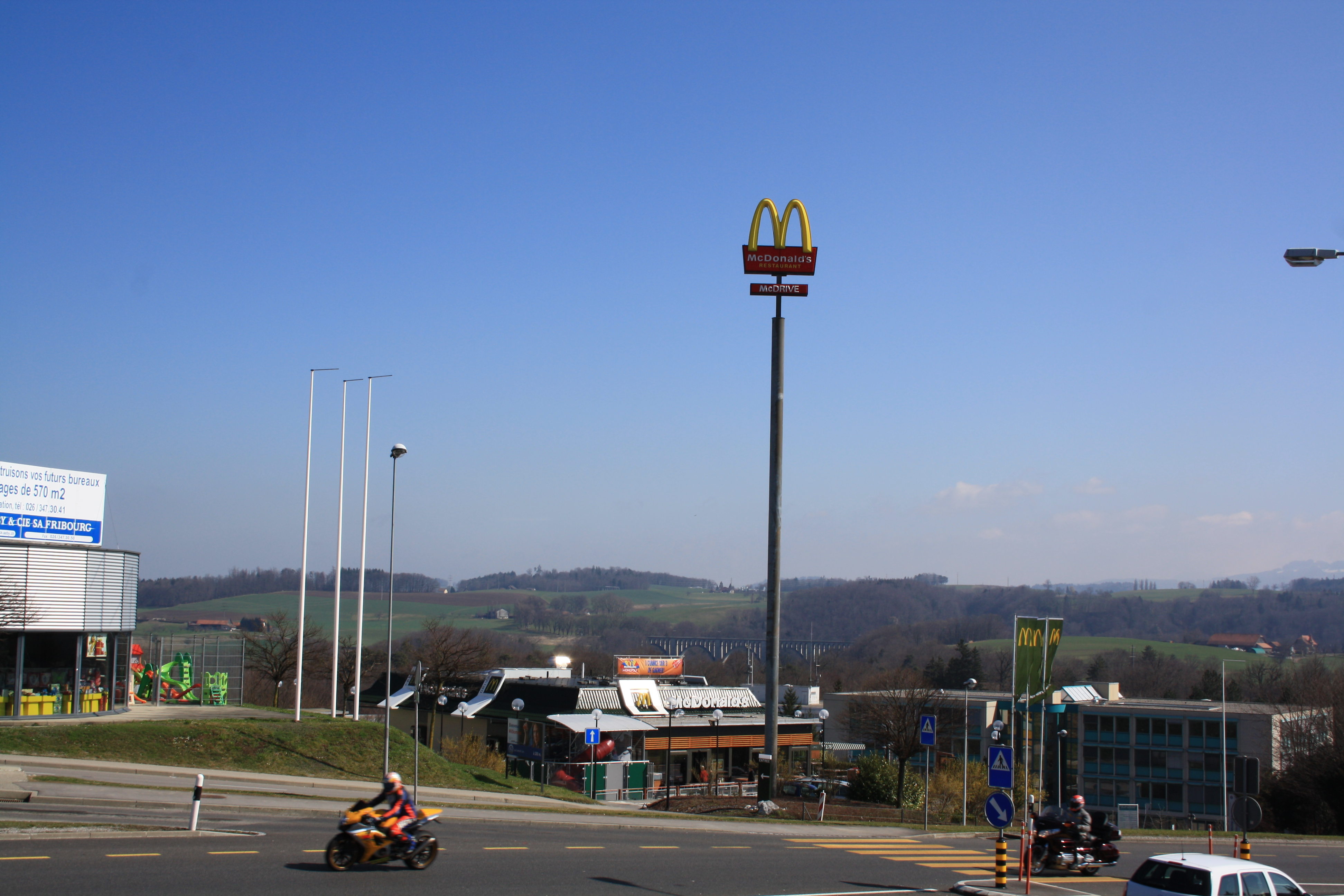 Granges-Paccot